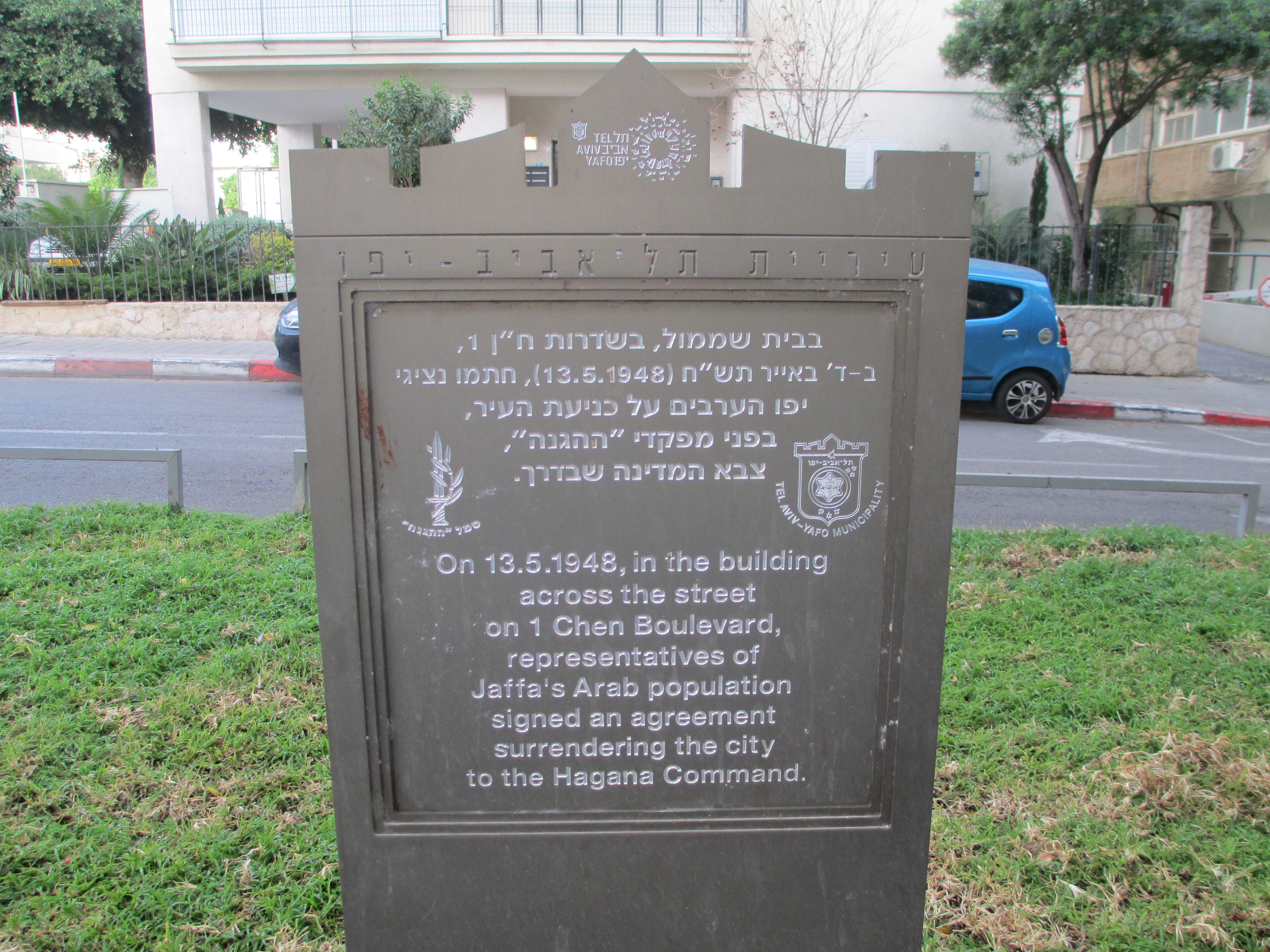 לוחית זיכרון מול הבניין בשדרות ח"ן מס' 1 בו נחתם הסכם כניעת יפו ב-1948